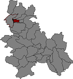 Localització de la Guàrdia Pilosa dins el municipi de Pujalt